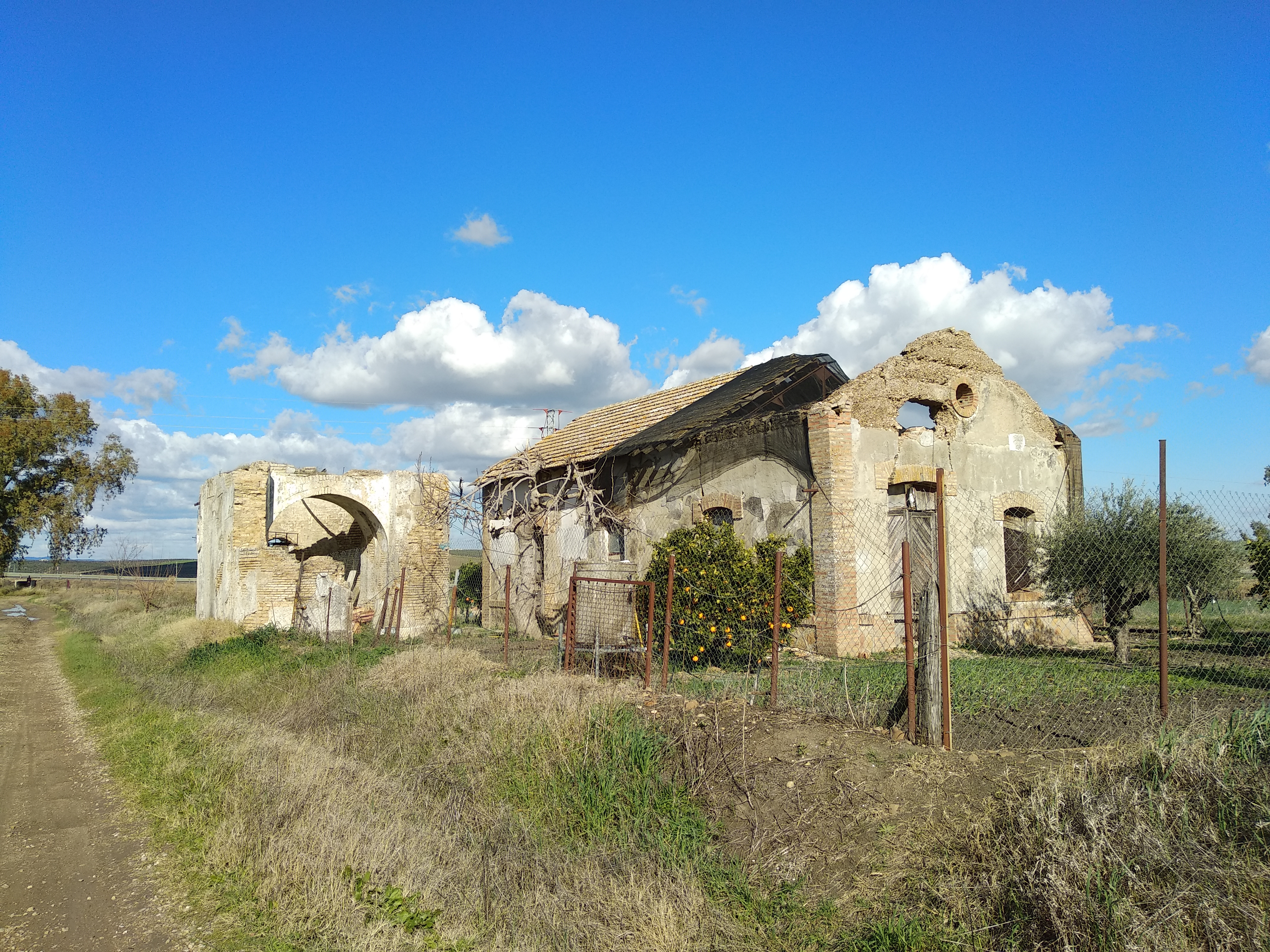 Antigua estación de La Carlota en La Fuencubierta (Córdoba)